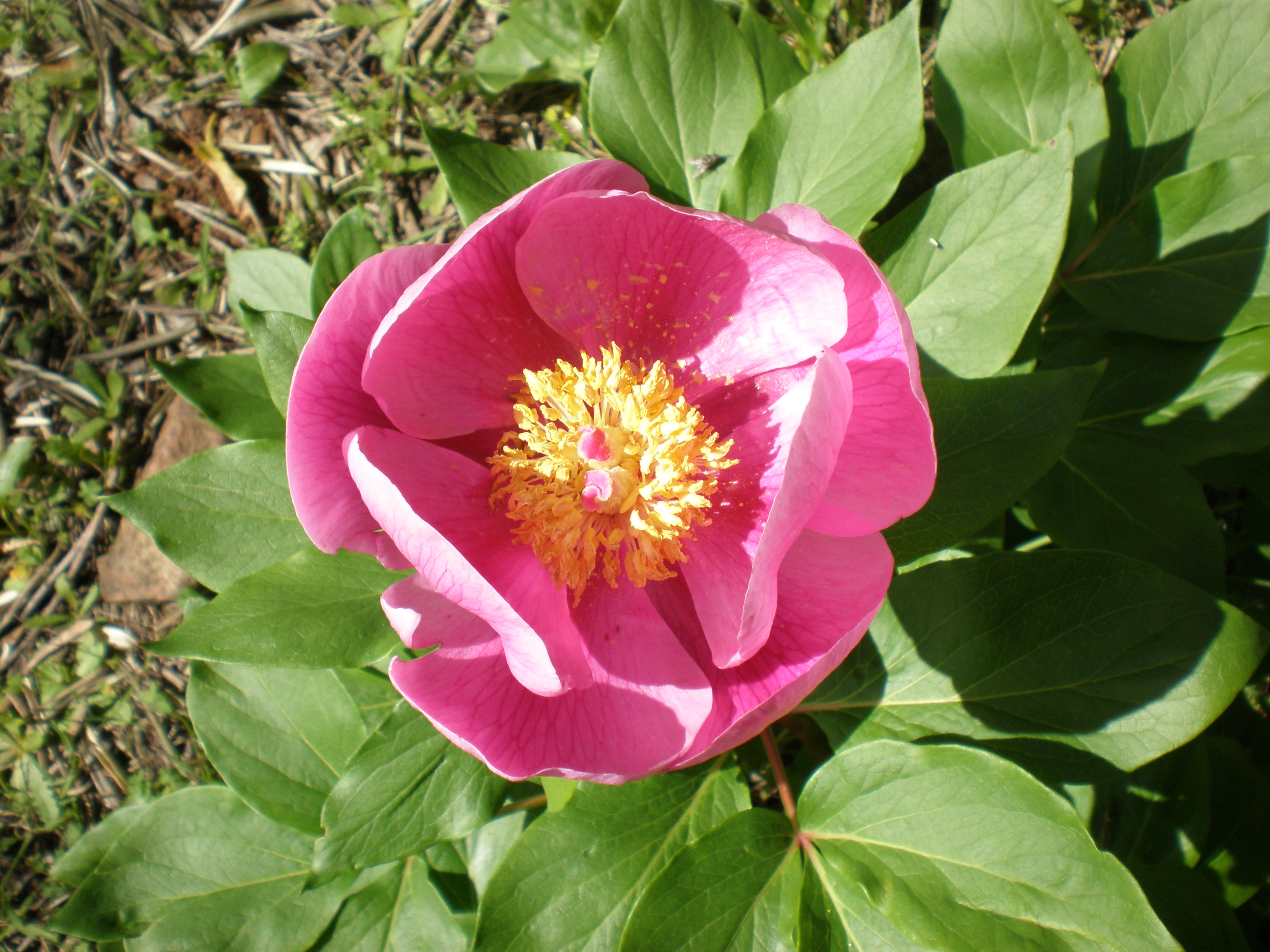 Paeonia broteri